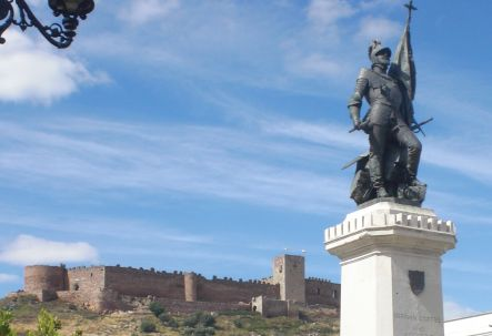 Statuo de Korteso en Medellín